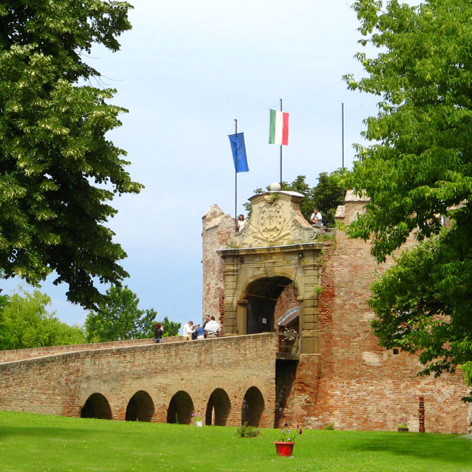 Siklós - a vár bejárata